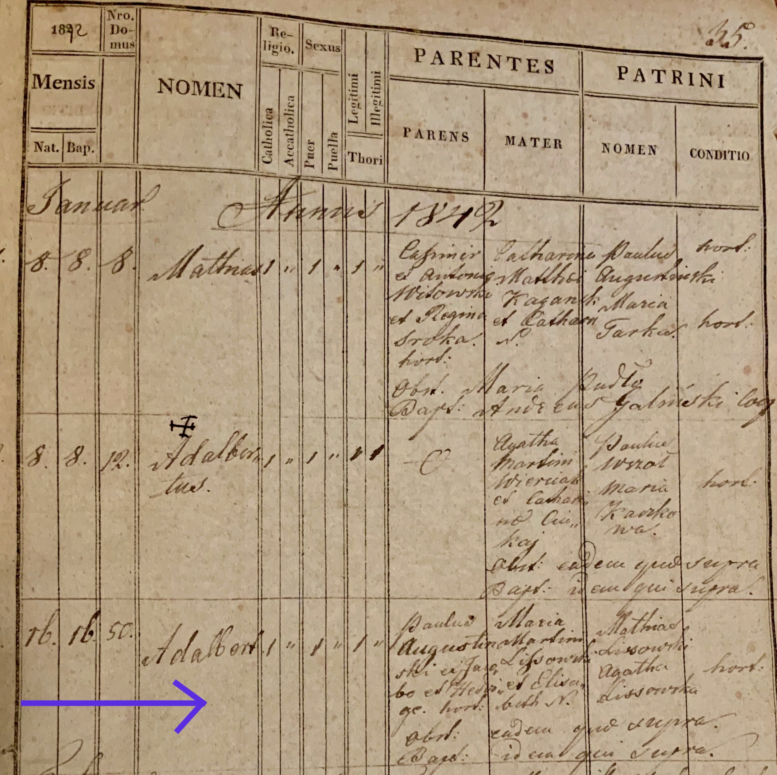 Wpis do księgi ochrzczonych parafii w Otfinowie z zaznaczeniem danych dotyczących Wojciecha Augustyńskiego